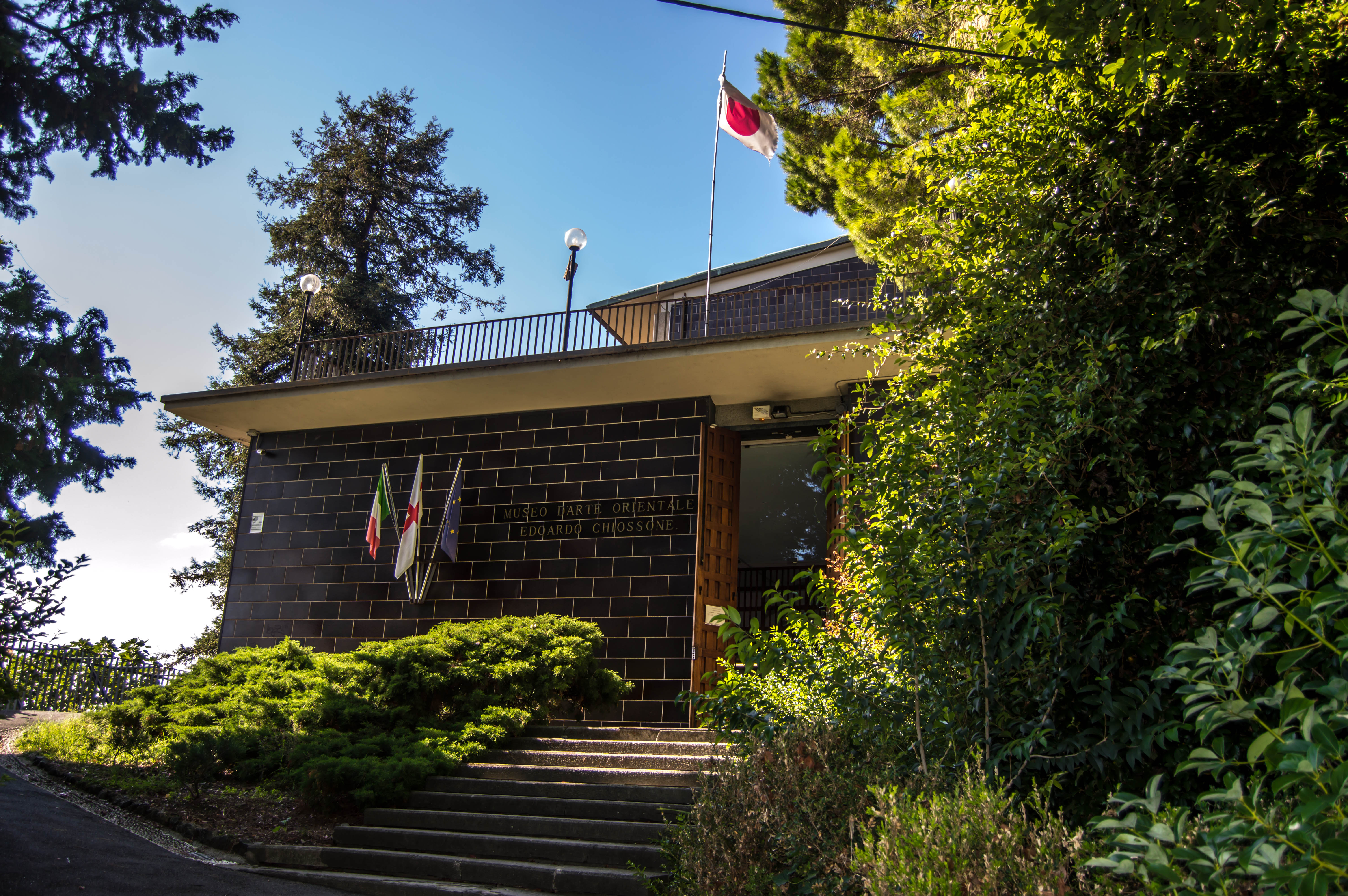 Museo d'arte orientale Edoardo Chiossone This is a photo of a monument which is part of cultural heritage of Italy.